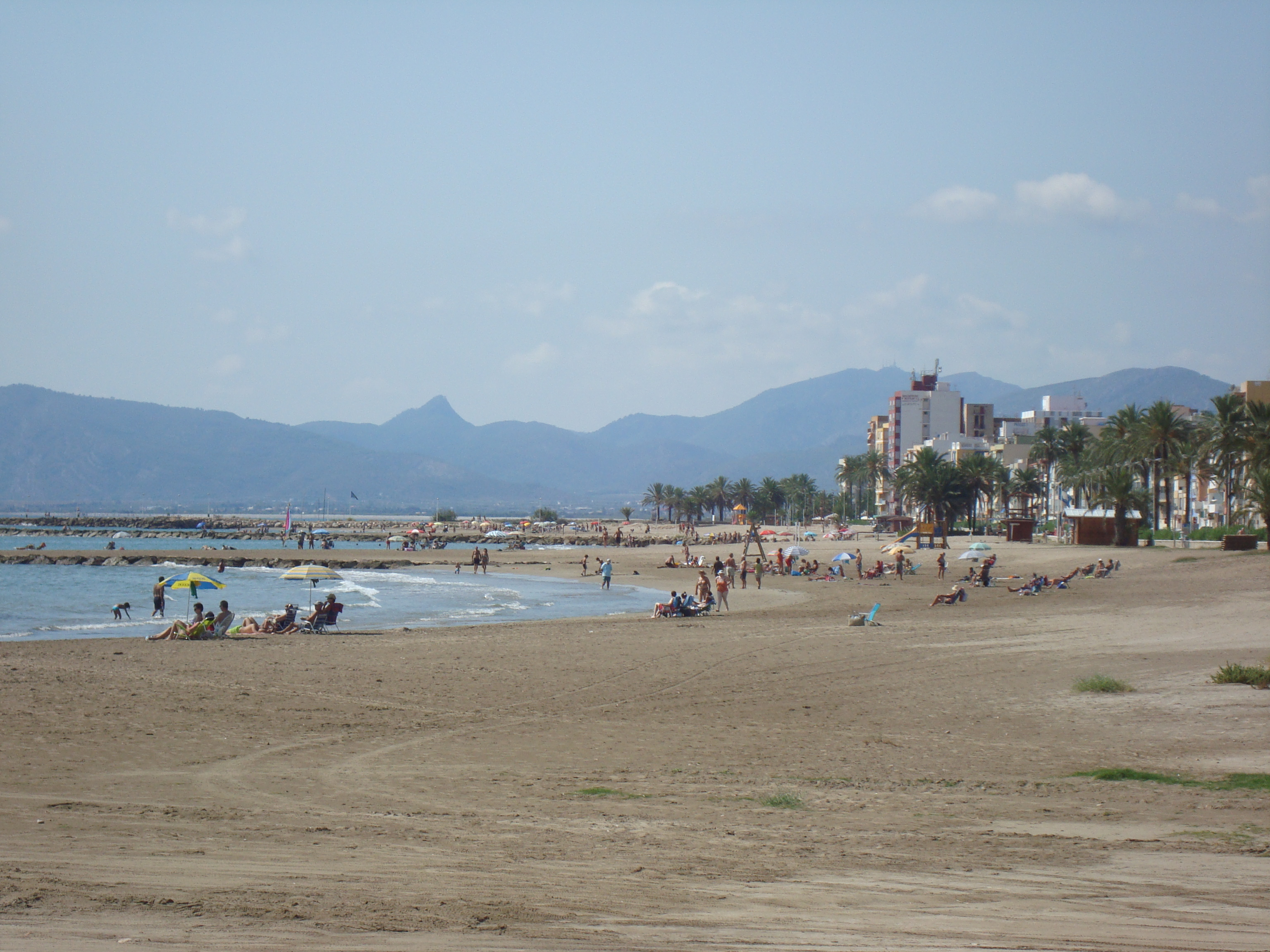 Playa Norte de Torreblanca, Castellón